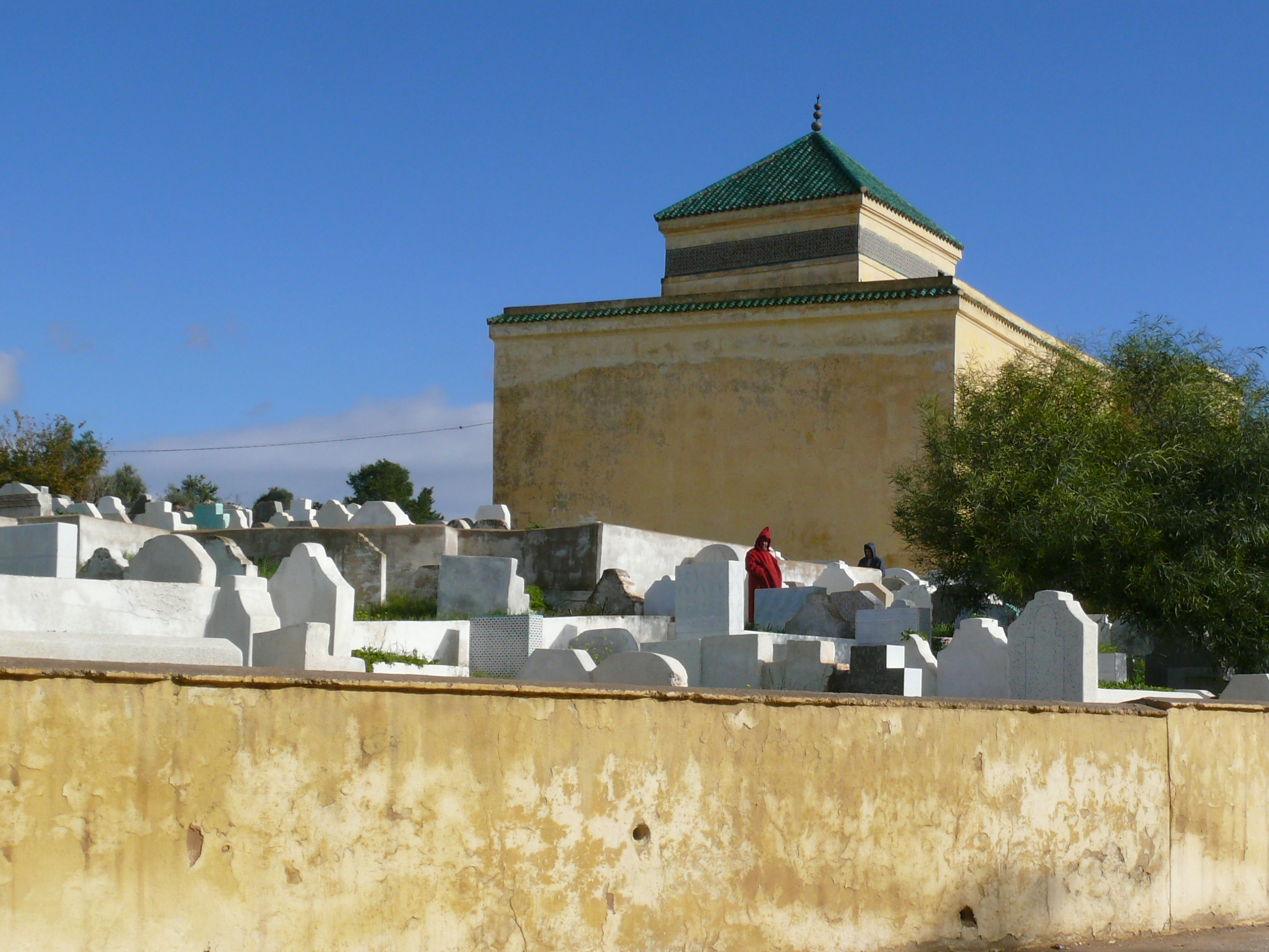 Die Grabanlage von Ibn al-ʿArabī al-Maʿāfirī in Fès, Marokko